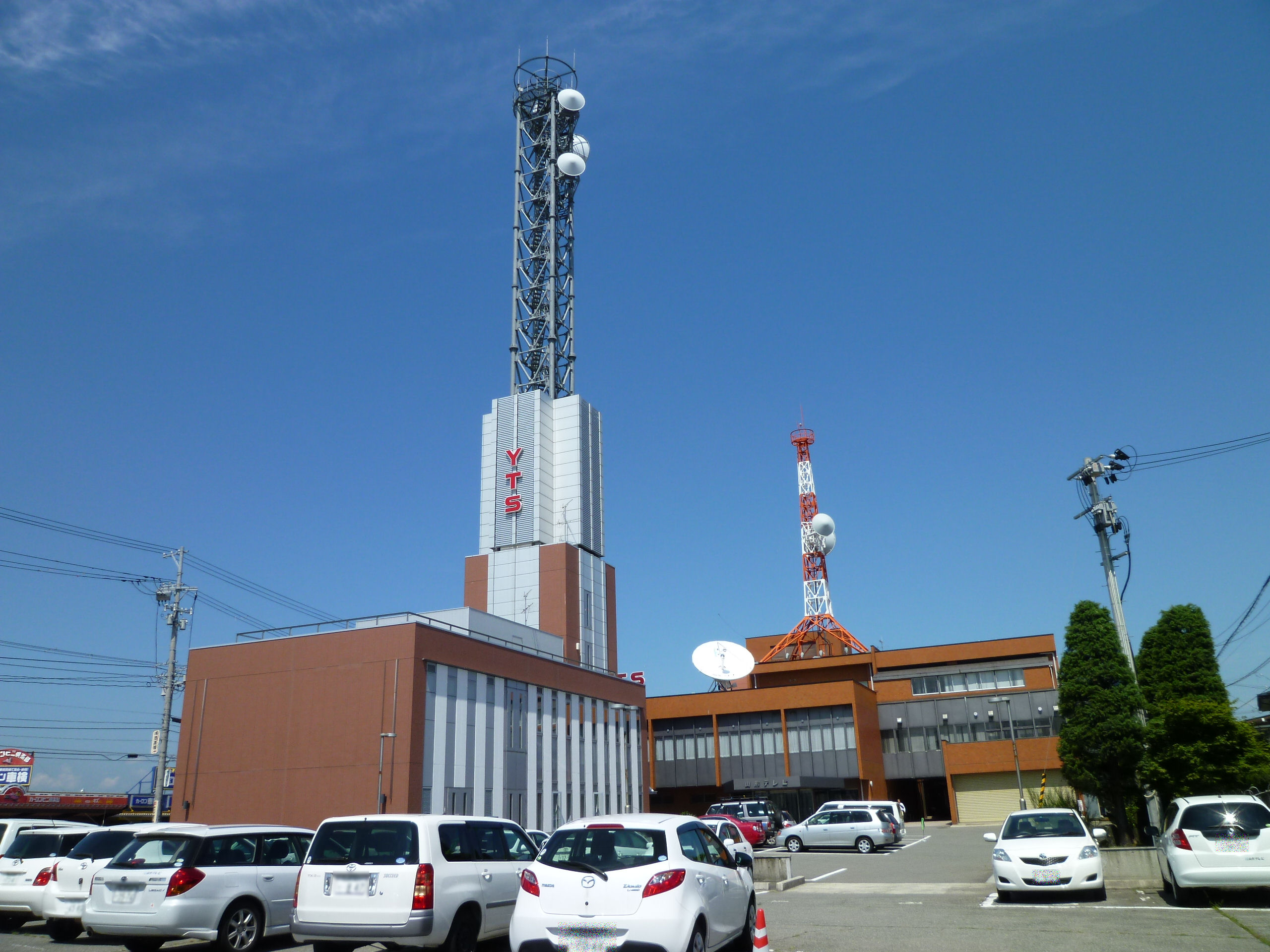 山形テレビ本社屋